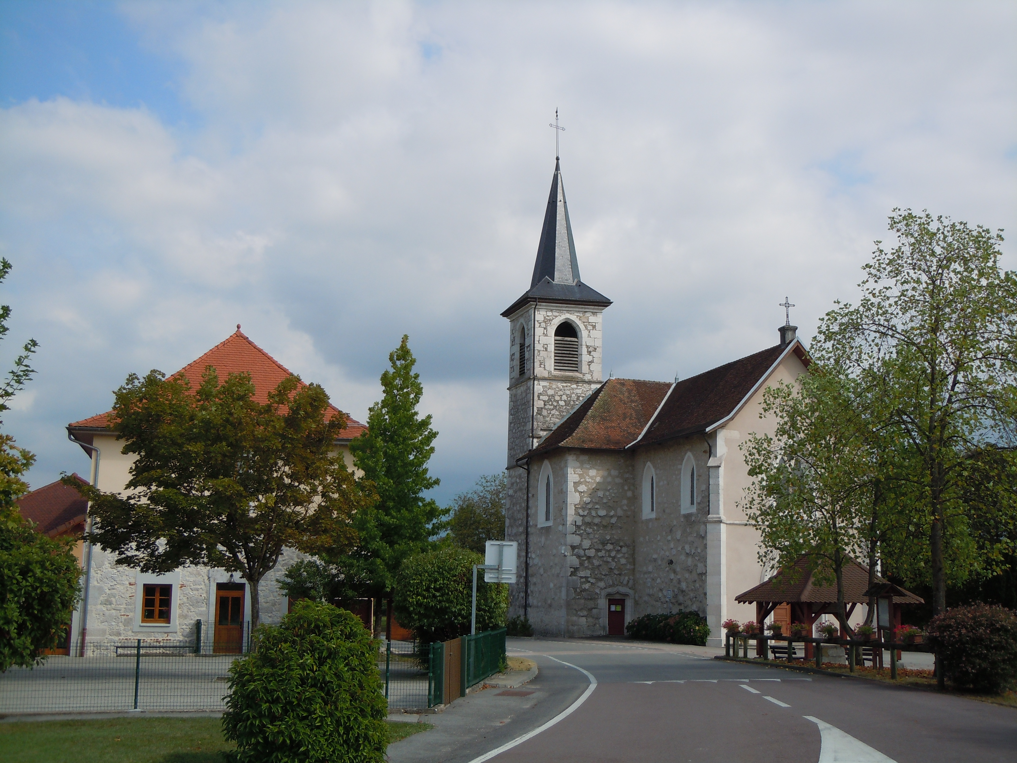 Belmont-Tramonet - Eglise et Mairie - Savoie - France